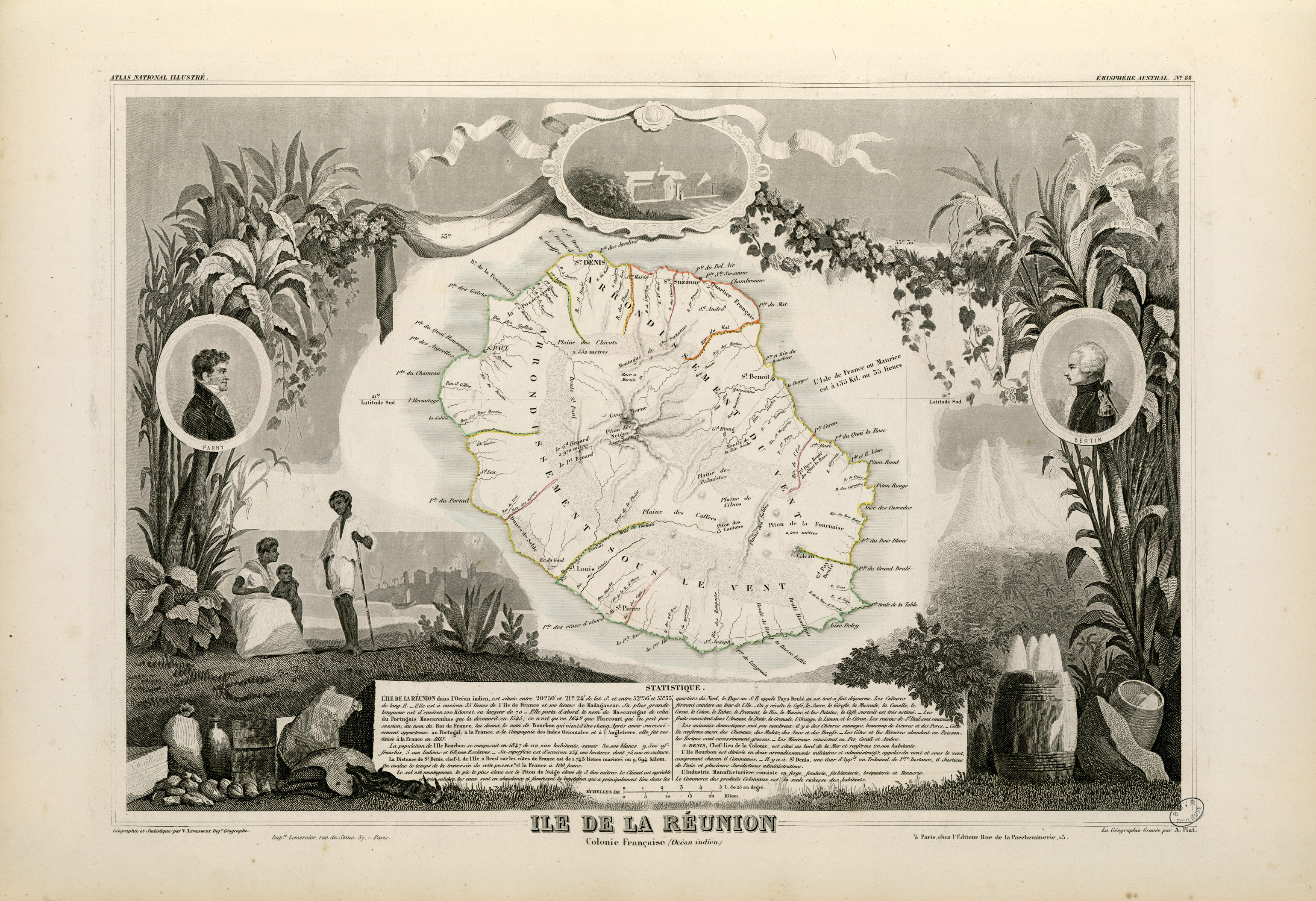 Titre complet du recueil : Atlas national illustré des 86 Départements et des Possessions de la France divisé par Arrondissements, Cantons et Communes avec le tracé de toutes les routes, chemins de fer et canaux. Dressé d'après les Travaux du Cadastre du Dépôt de la Guerre et des Ponts et Chaussées par V. Levasseur, Ingénieur Géographe attaché au Génie du Cadastre et de la Ville de Paris. Gravé sur acier par les meilleurs artistes. Imprimerie de Lemercier à Paris ou imprimerie Dupuich à Paris. Page de titre et 100 pl. en n. et b. et en coul. dont un tableau statistique et 2 cartes dépliantes. Ancely, René (1876 - 1966). Possesseur